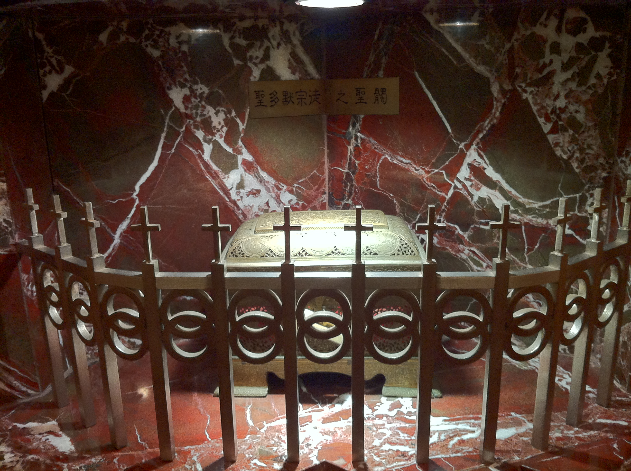 中文（香港）: 聖多默宗徒堂聖多默聖髑, 香港, 中國